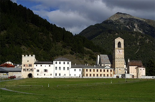 Müstair (Münster): Clostra San Jon (Kloster St. Johann)